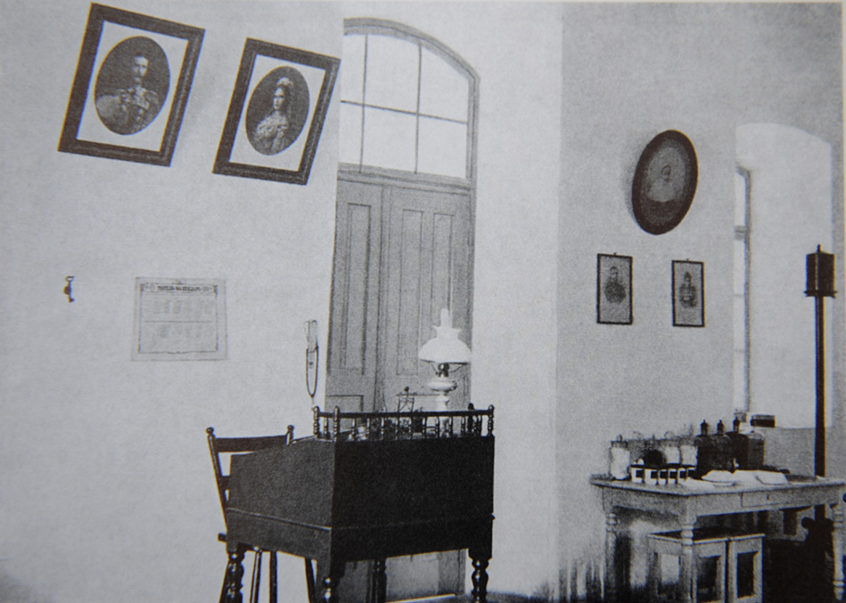 Приемная Сергиевского подворья ИППО в Назарете. 1907 г.